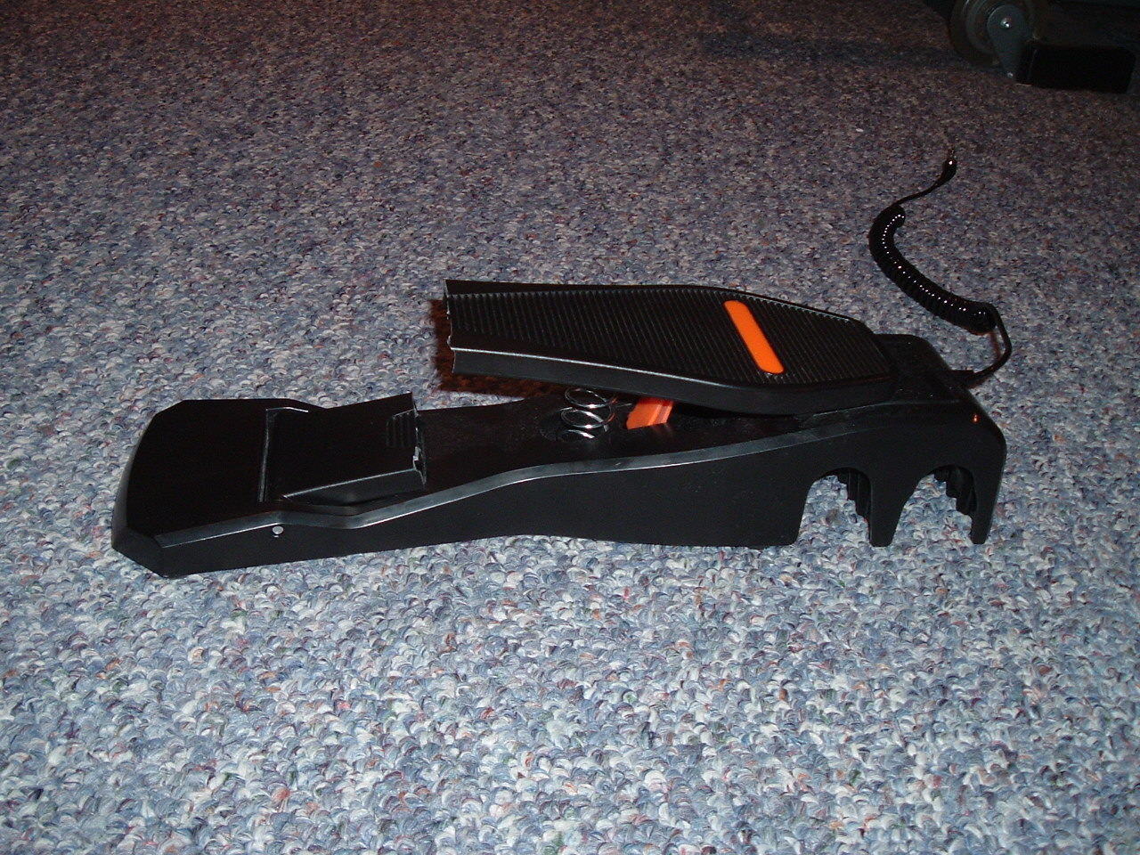 A broken Xbox 360 Rock Band bass drum pedal